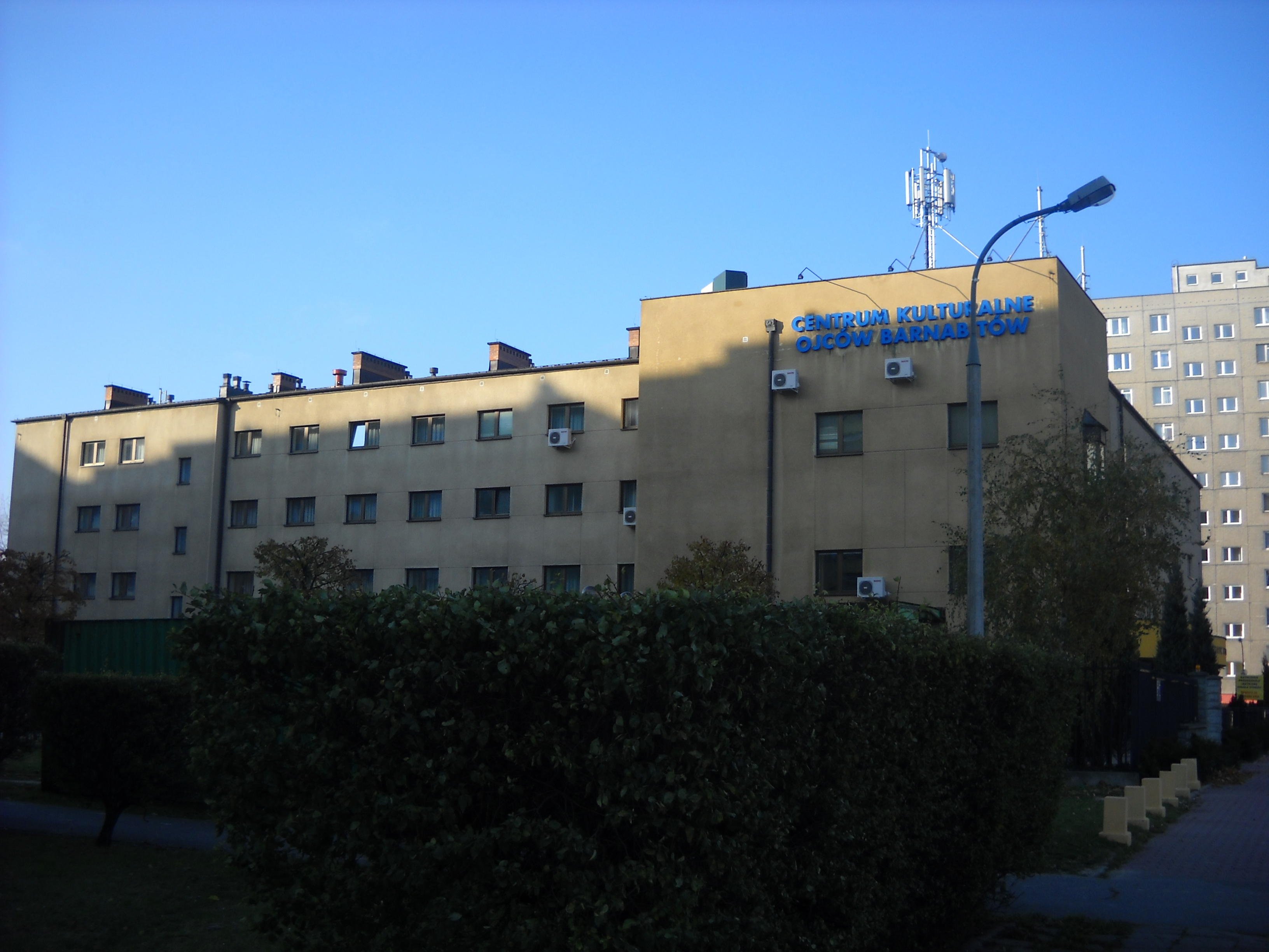 Centrum Kulturalne Ojców Barnabitów w Warszawie, ul. Smoluchowskiego 1